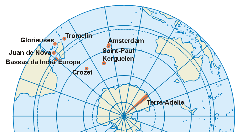 Carte des Terres australes et antarctiques françaises Map of French Southern and Antarctic Lands in French